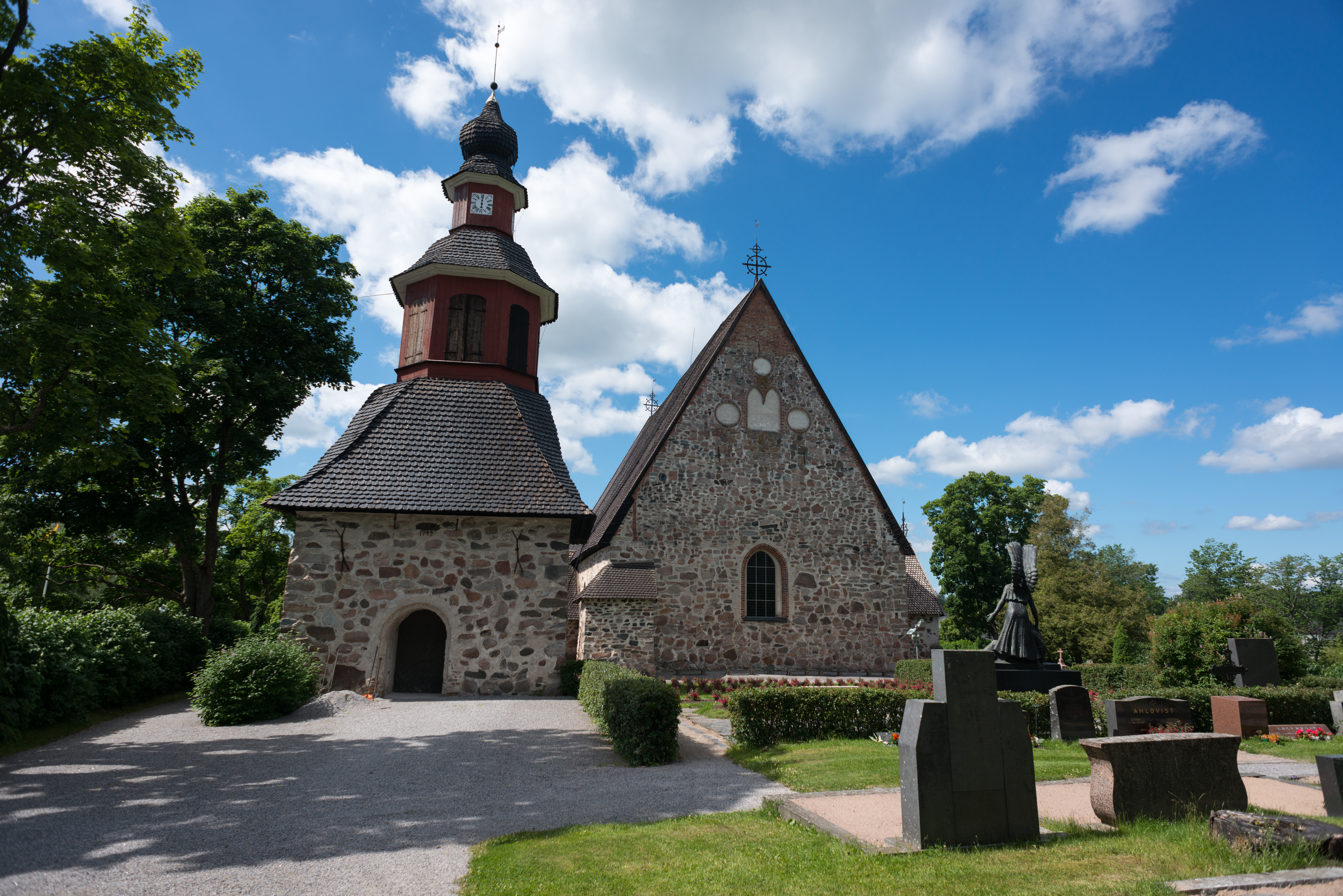 Perniön kirkko Perniössä